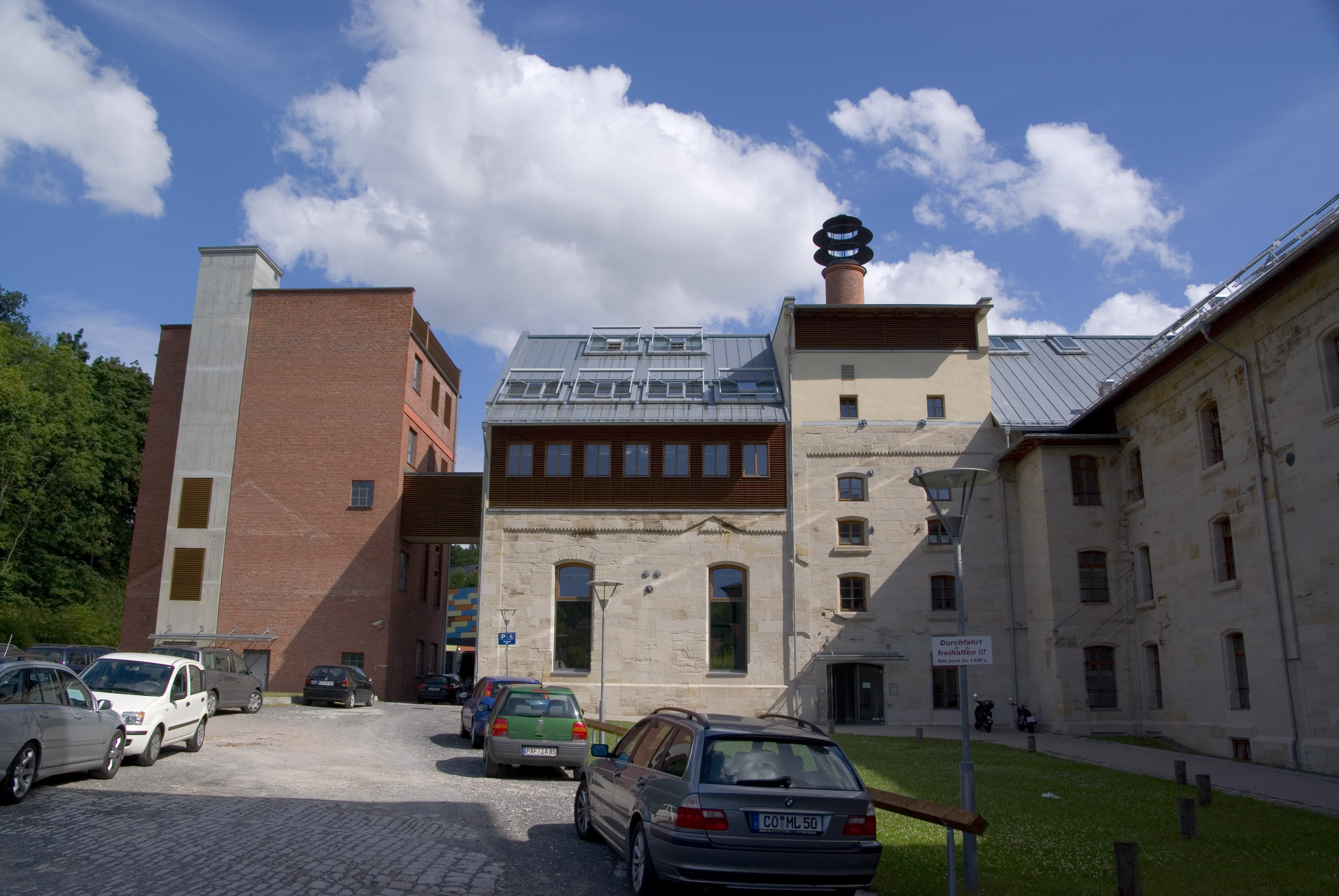 Hofbräuhaus in Coburg, Bayern. Rückseite